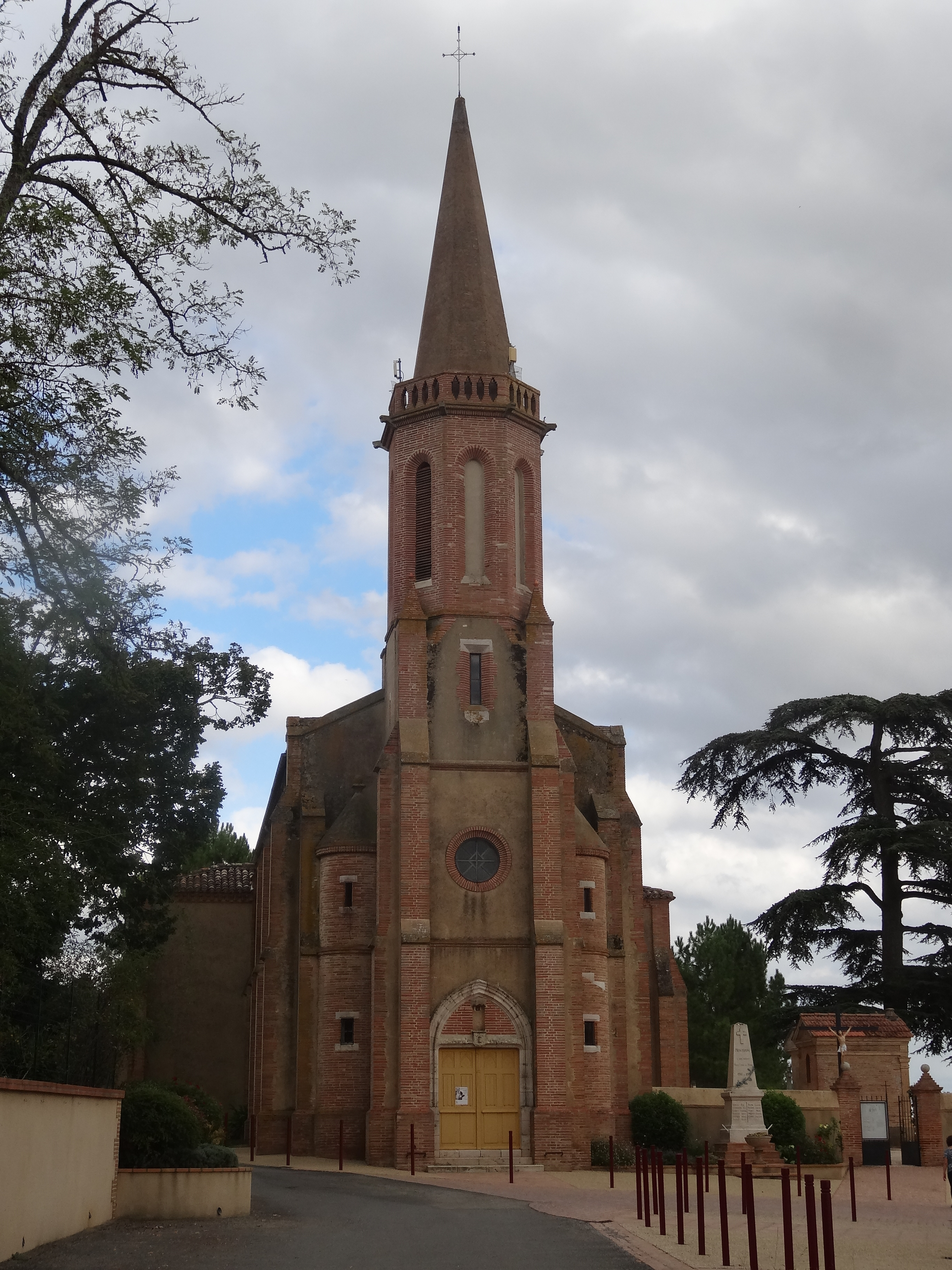 Le clocher de l'église de Montiron.